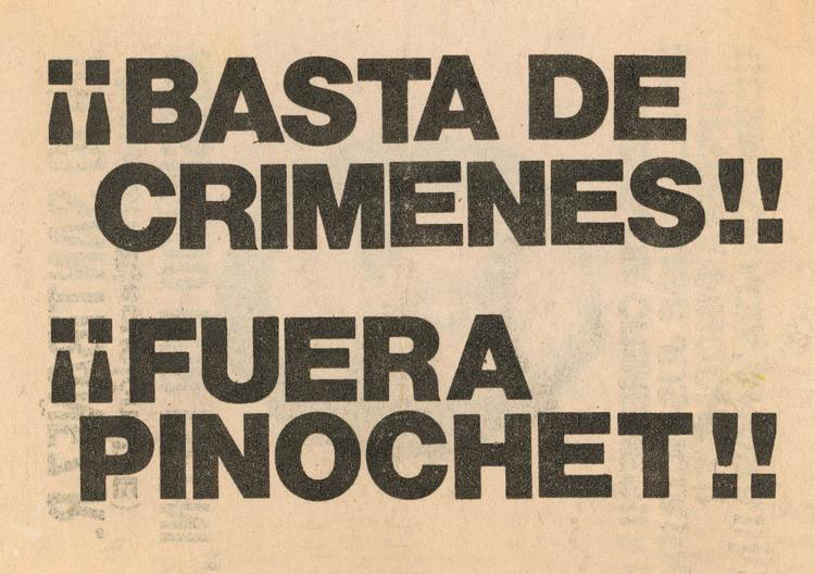 ¡¡Basta de crímenes!! ¡¡Fuera Pinochet!! Panfletos del período de la dictadura militar chilena (1973-1988) (english: "Stop the crimes! Away with Pinochet!" - a leaflet from the era of military rule in Chile (1973 - 1988) / german: "Schluss mit den Verbrechen! Pinochet raus!" - Handzettel aus der Zeit der chilenischen Militärdiktatur unter Augusto Pinochet.)